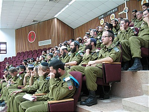 צוערים בקורס רבנים צבאיים בשיעור בבית הספר לקצינים